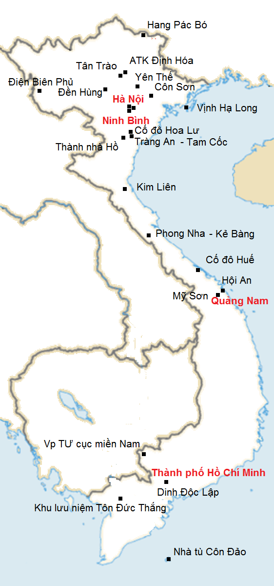 Danh sách các di tích quốc gia đặc biệt ở Việt Nam